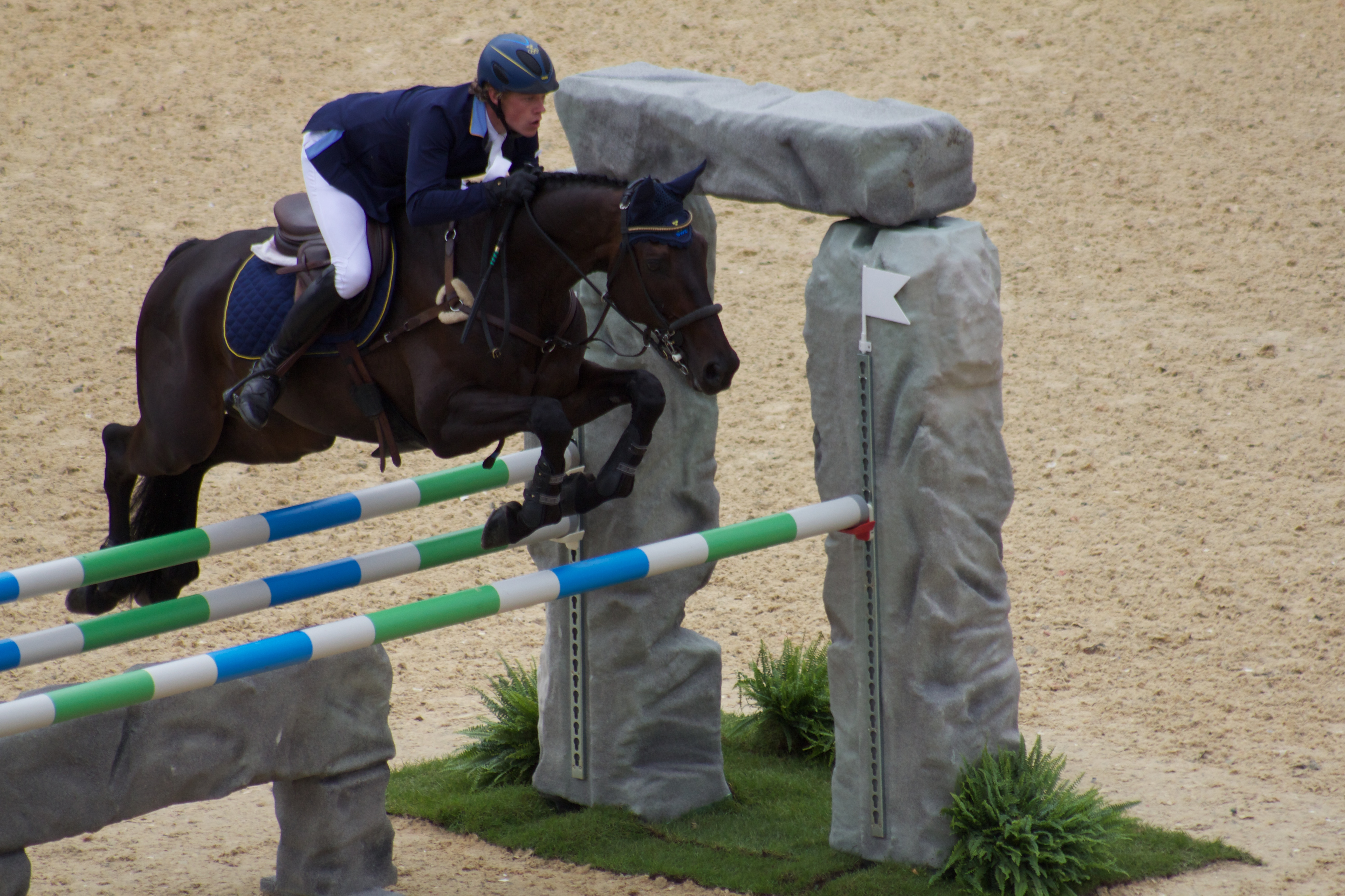 Ludwig Svennerstål och Shamwari under banhoppningen under fälttävlan vid olympiska sommarspelen 2012